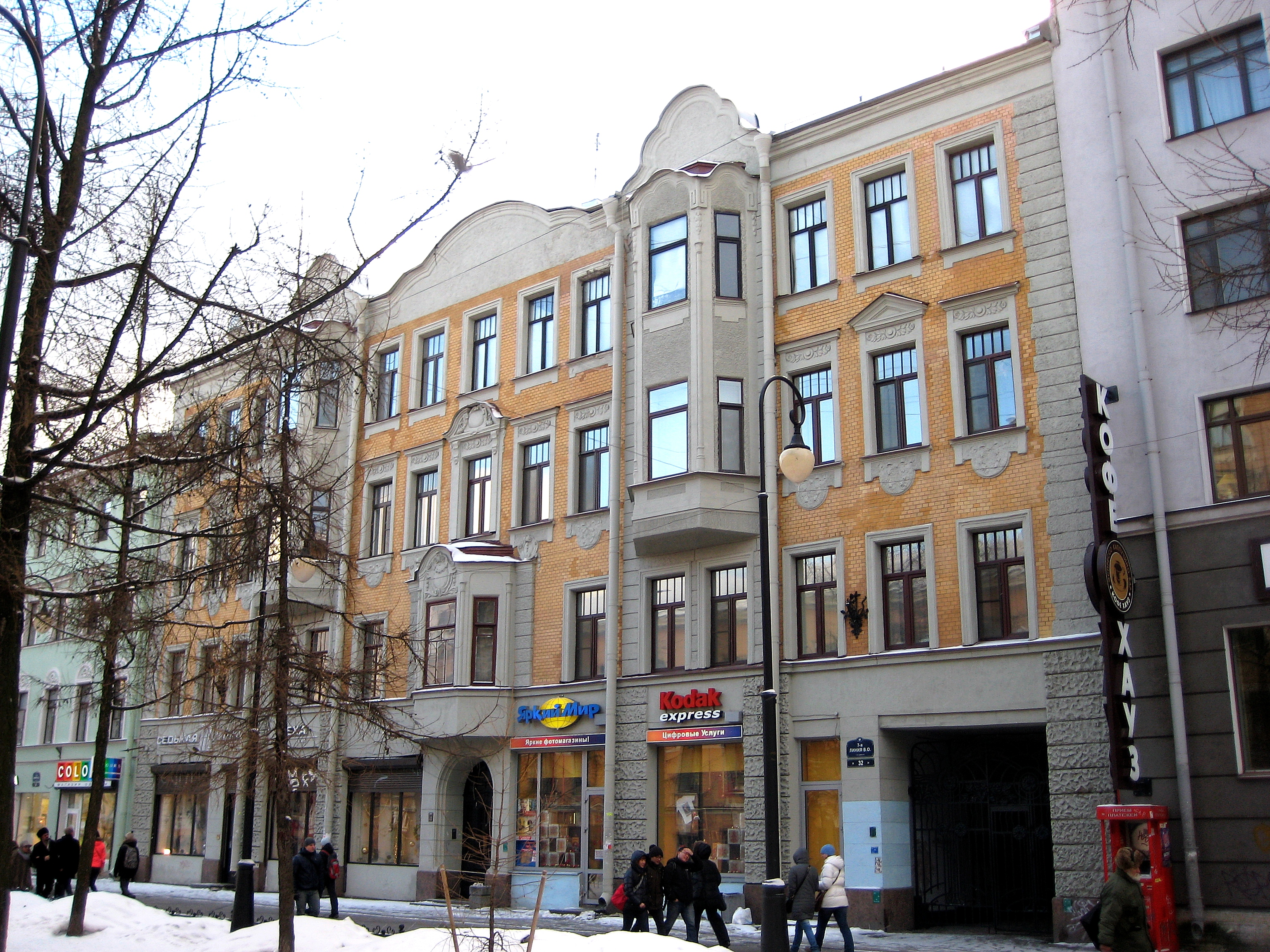 Зимний Санкт-Петербург. Доходный дом П.А.Изотова. 1909-1910гг. 7-я линия, 32